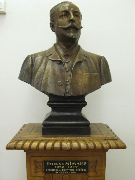 Buste d'Etienne Mimard